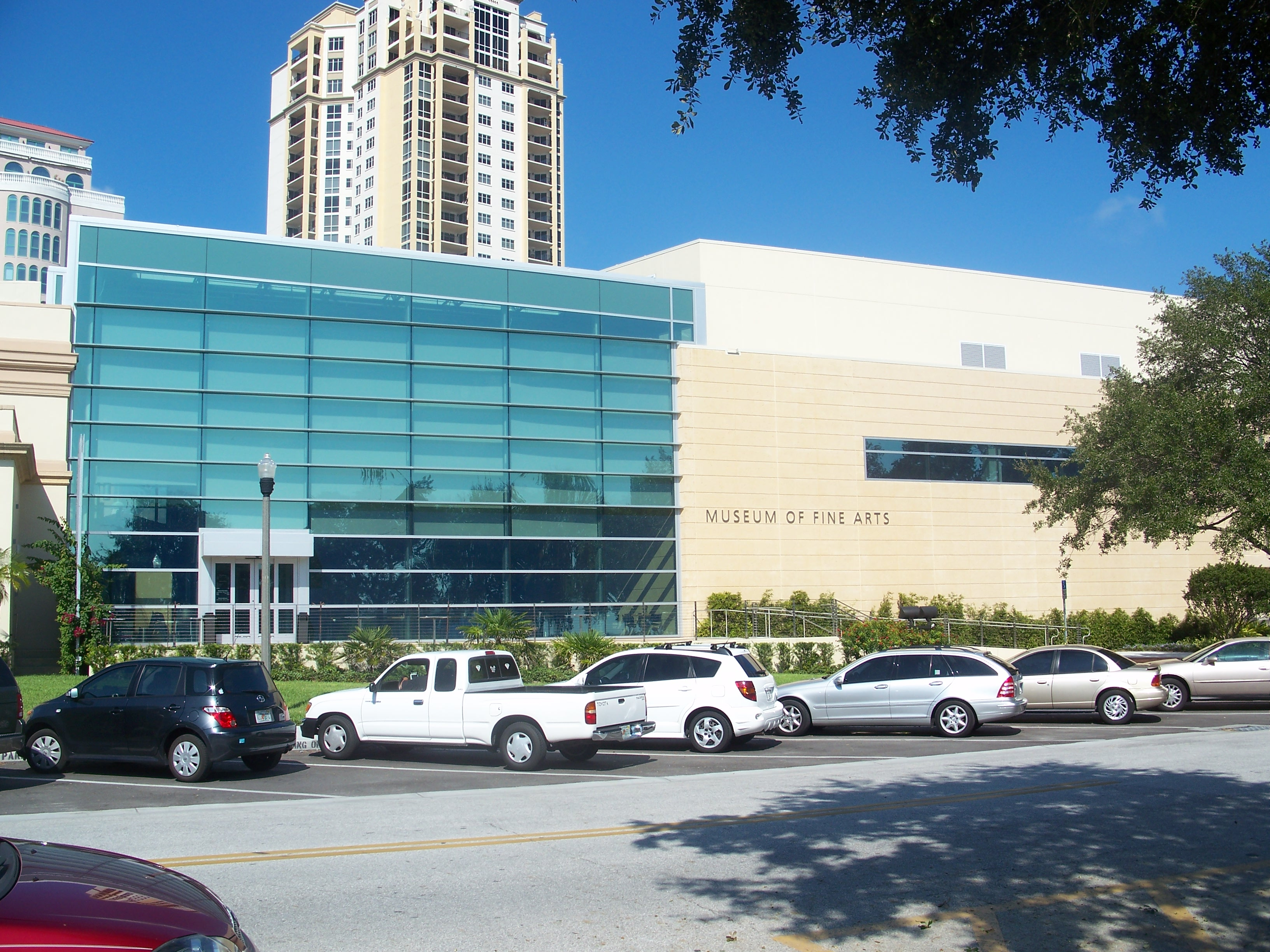 St. Petersburg, Florida: Museum of Fine Arts